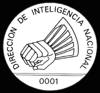 Logo de la Dirección de Inteligencia Nacional DINA